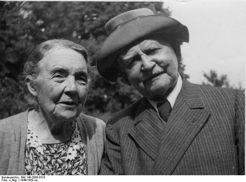 Professor Max Nonne und Frau [Henny Nonne], geb. Heye